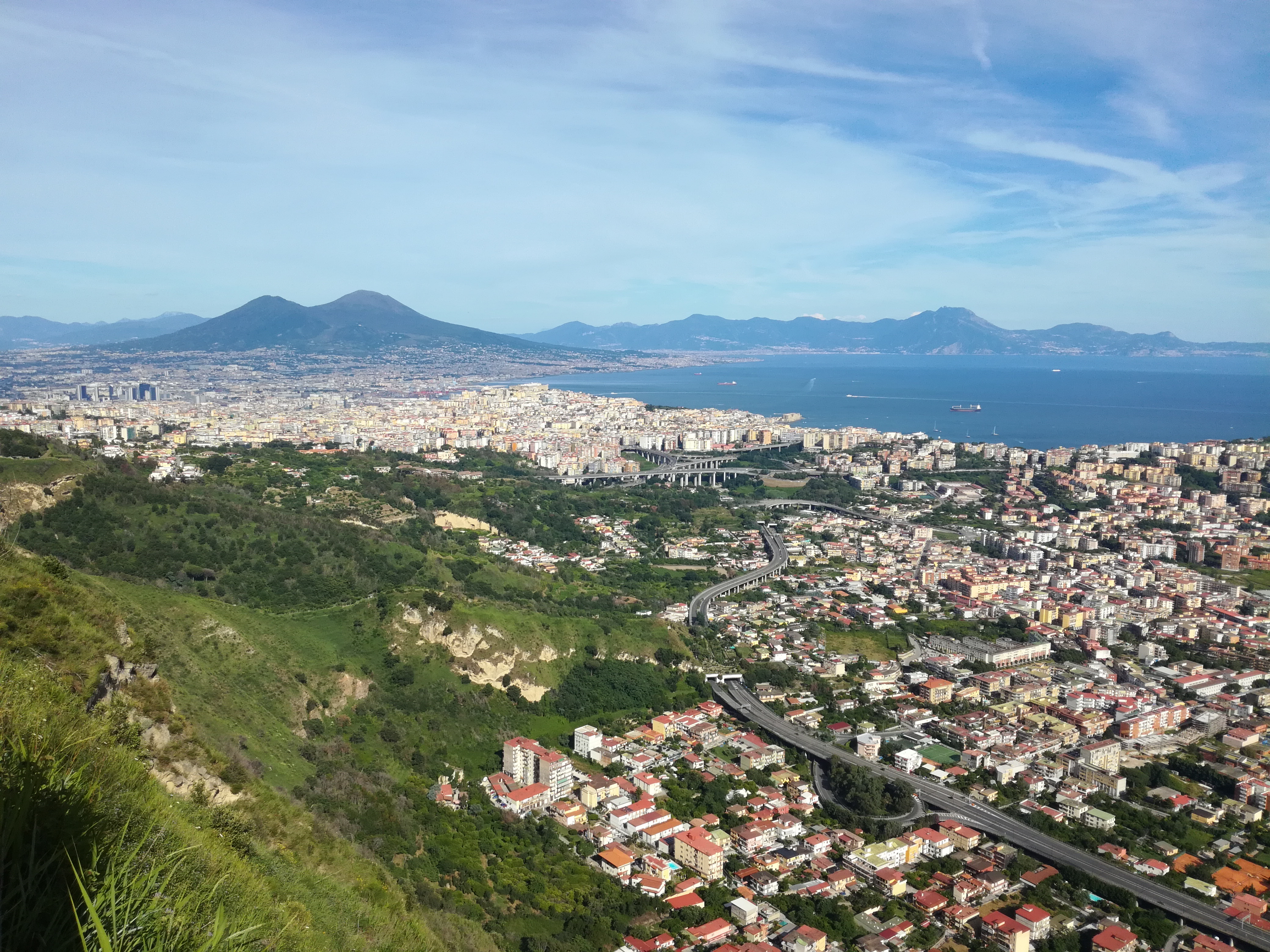 Veduta dall'Eremo dei Camaldoli